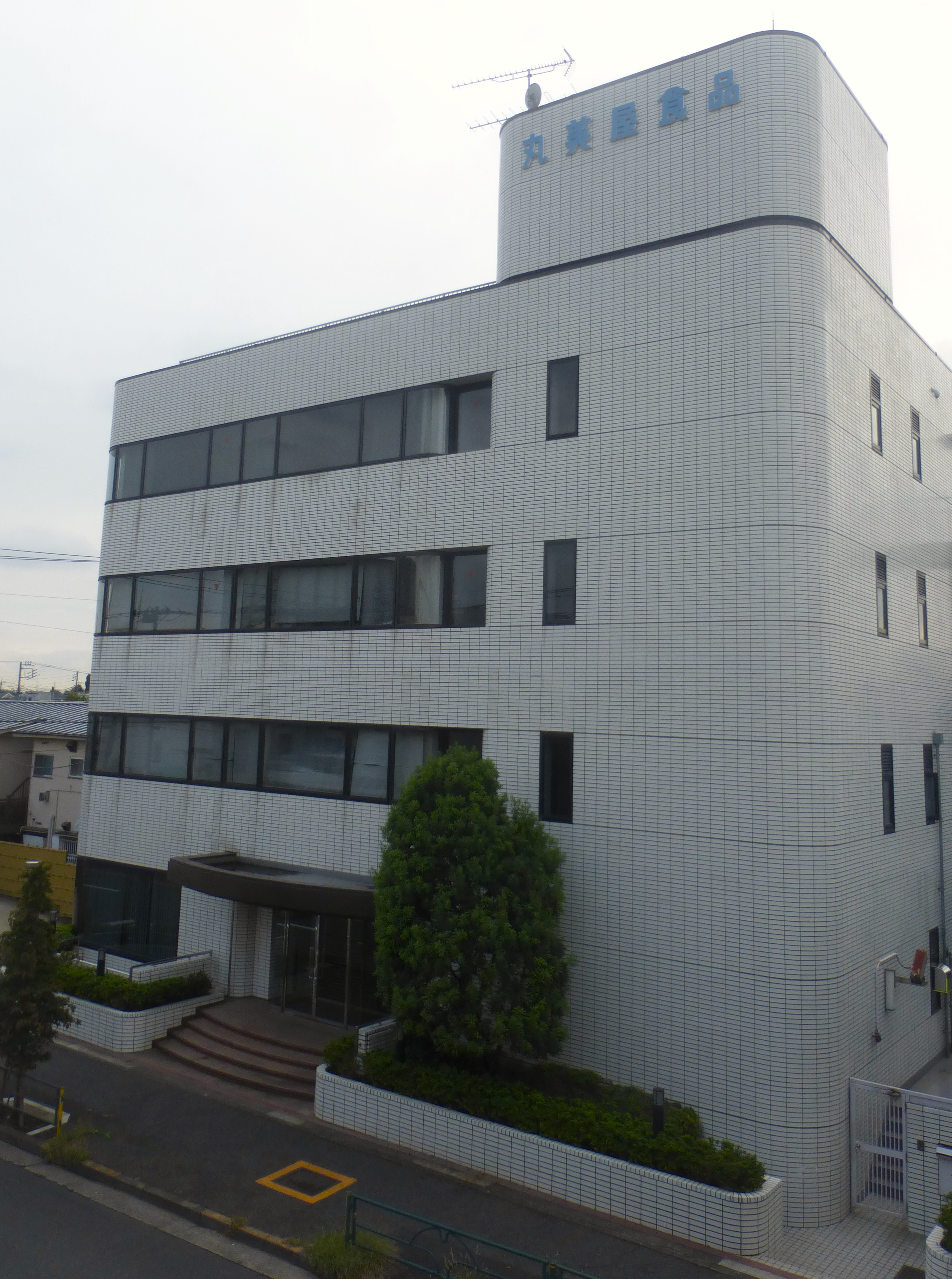 丸美屋食品工業株式会社の本社（まるみやしょくひんこうぎょう, Marumiya Corporation）